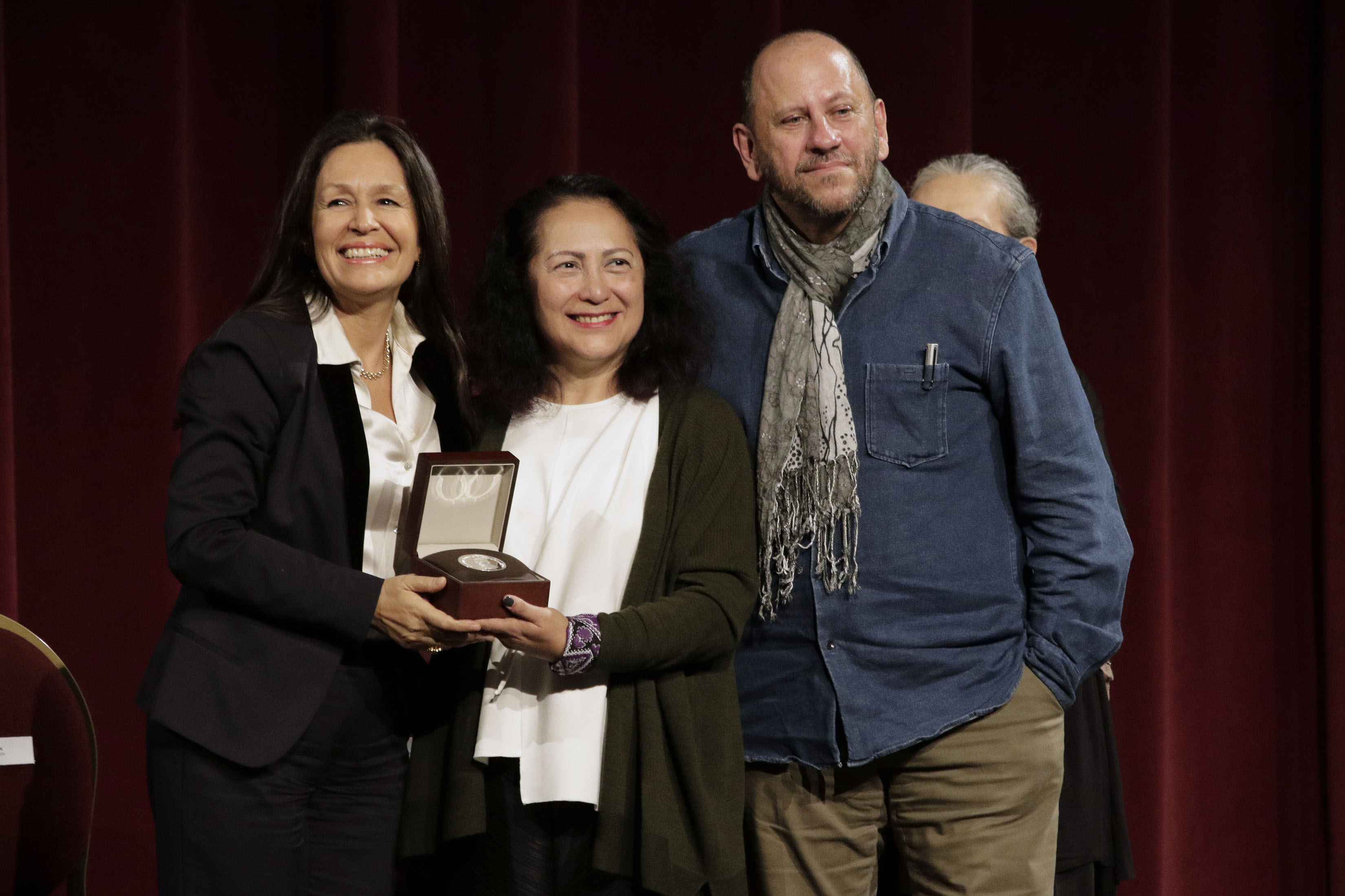 Jueves 1º de noviembre de 2018. Teatro de la Ciudad Esperanza Iris, inauguración de la 39 Muestra Nacional de Teatro con la obra "La extinta variedad del mundo", escrita y dirigida por Alberto Villarreal, con la Organización Teatral de la Universidad Veracruzana. En el acto protocolario se llevó a cabo la entrega de la Medalla Xavier Villaurrutia a la directora escénica Raquel Araujo y se develó la placa por los 100 años del Teatro de la Ciudad Esperanza Iris. Fotografía: Tania Victoria / Secretaría de Cultura CDMX.